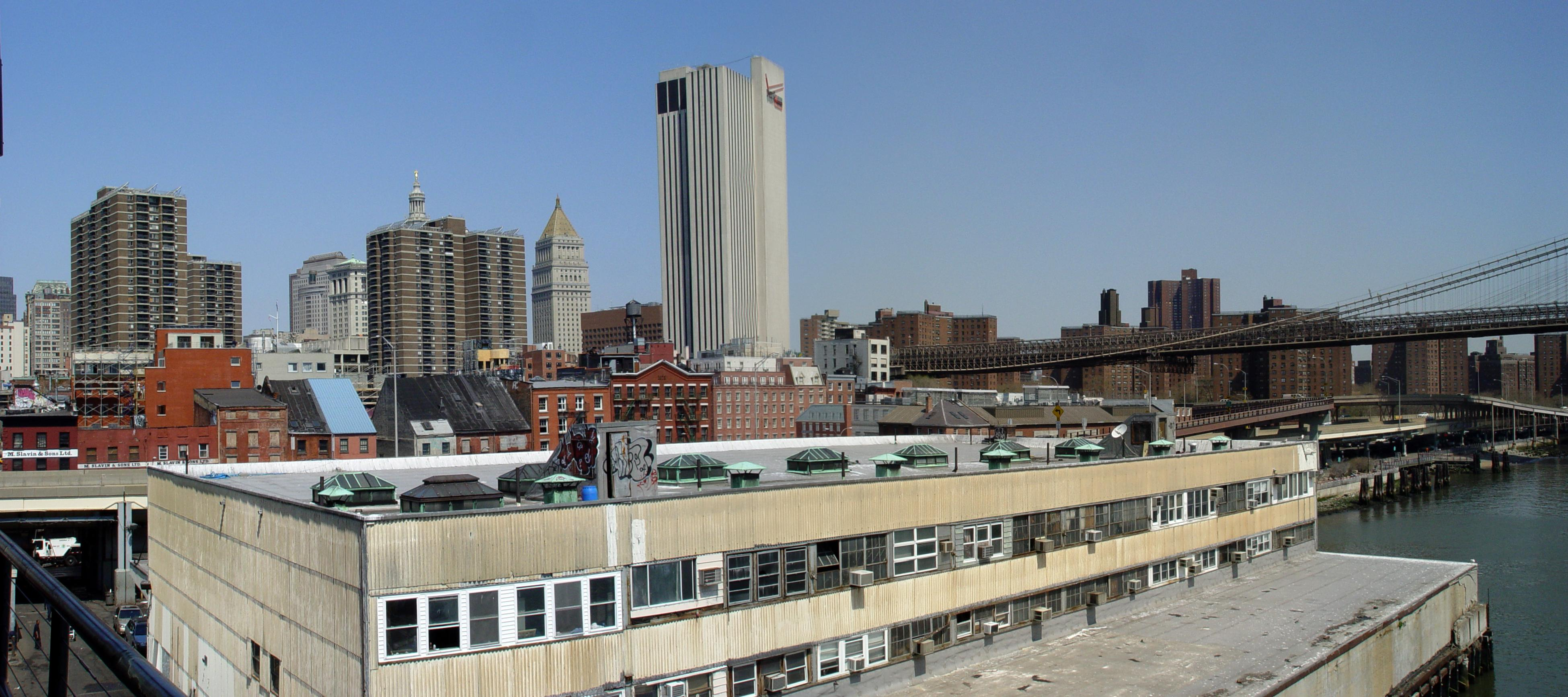 Fotografiert von Martin Dürrschnabel Fulton Fish Market in New York City.